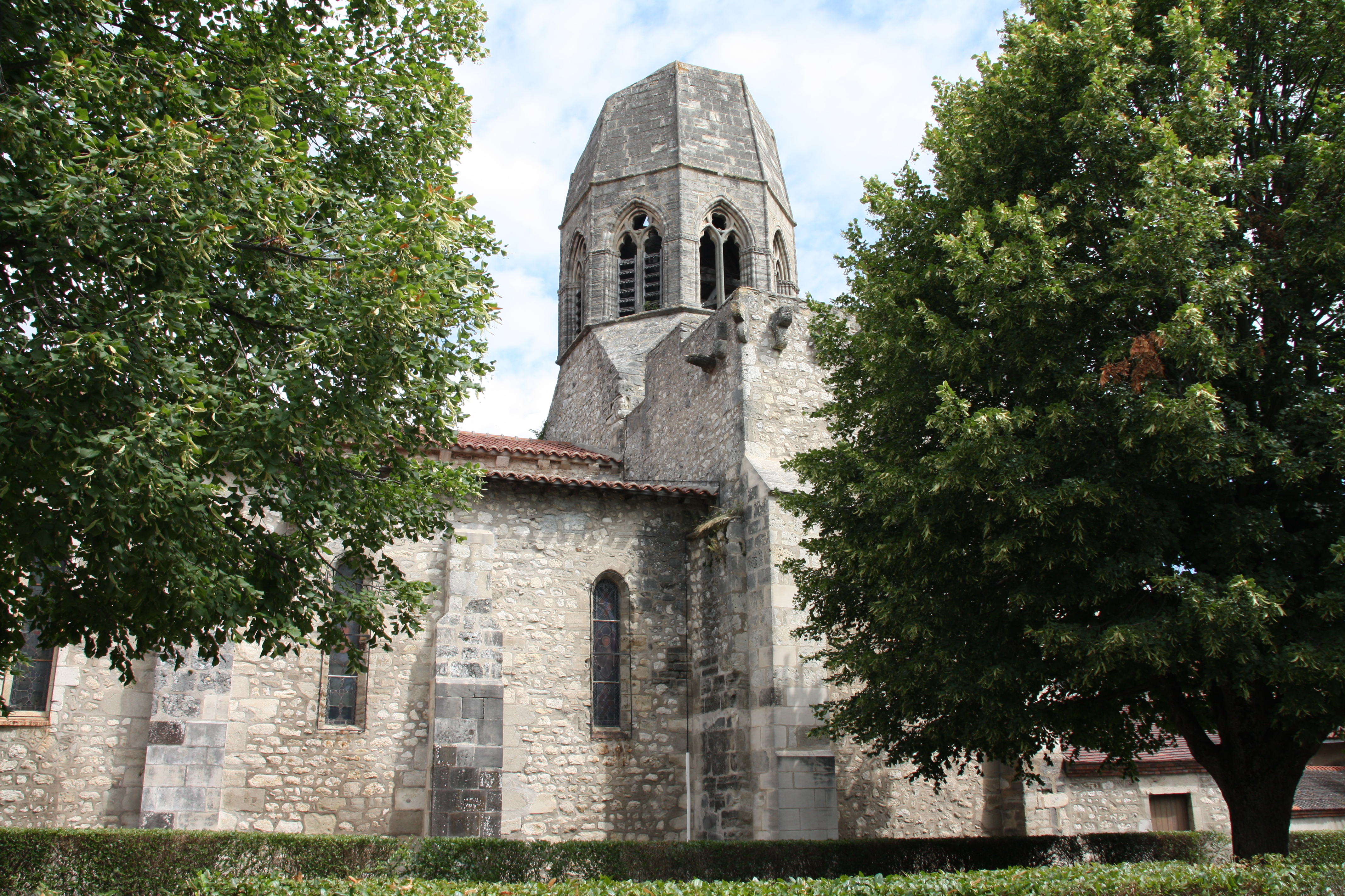 Église Saint-Jean-Baptiste de Charroux, Allier, France